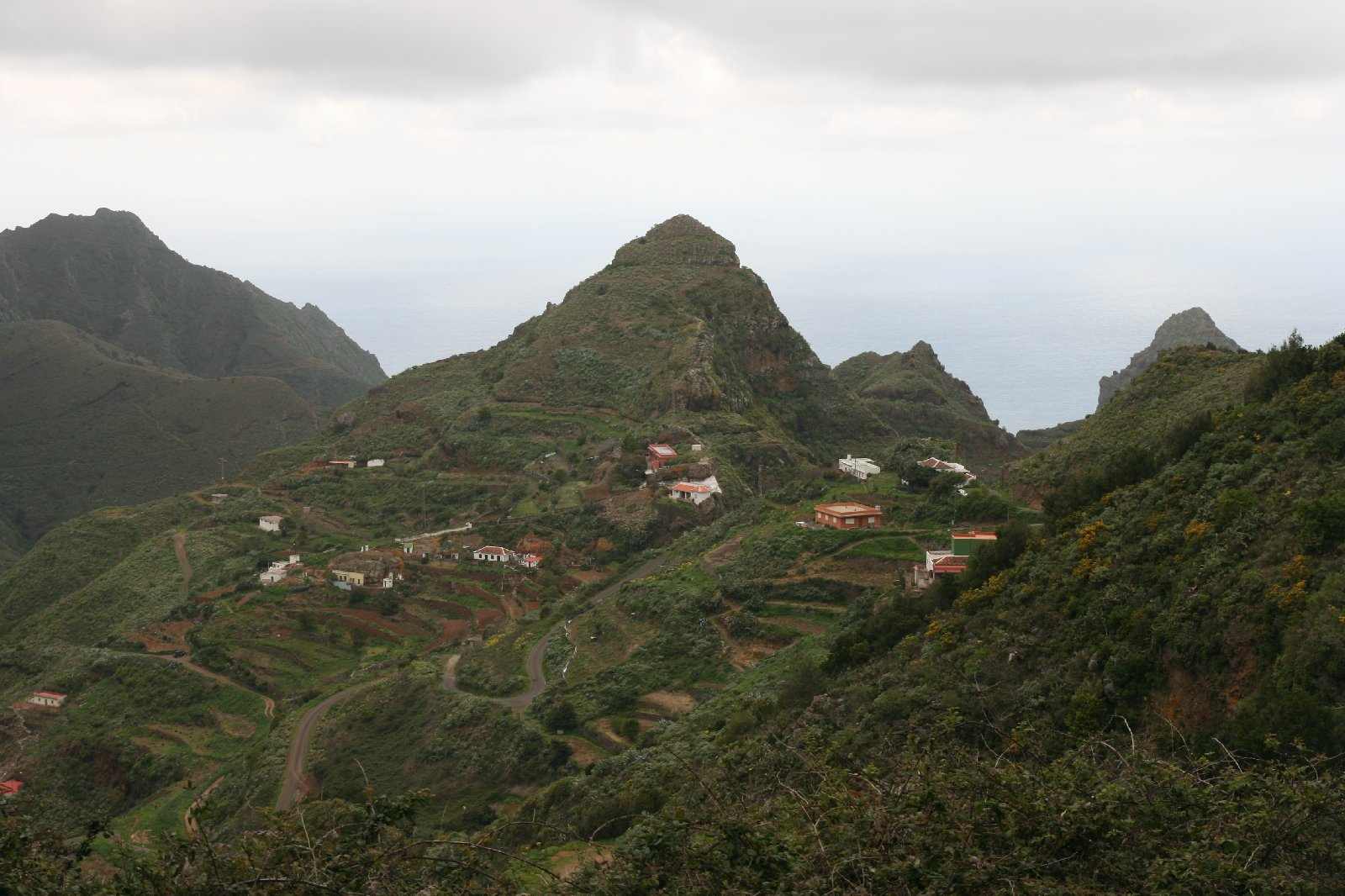 Vista de Begia